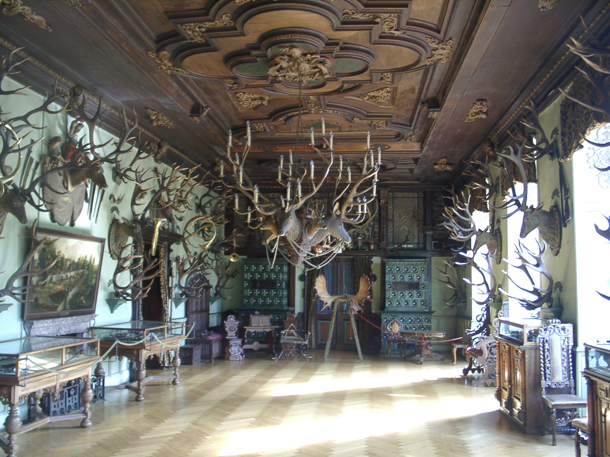 Erbach (Odenwald), Schloss